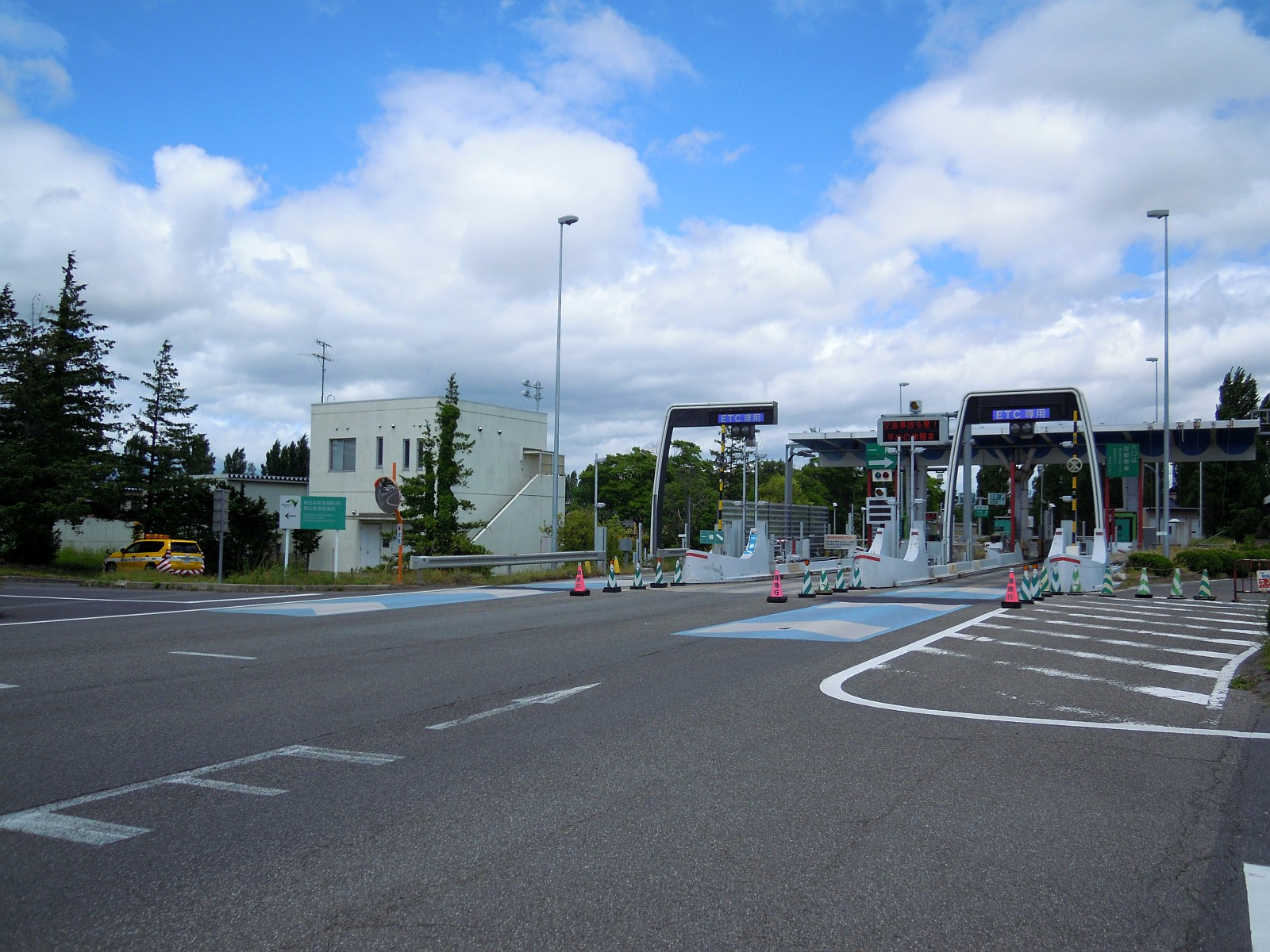 福島県郡山市にある東北自動車道郡山インターチェンジ料金所の入口レーンを一般道側から。